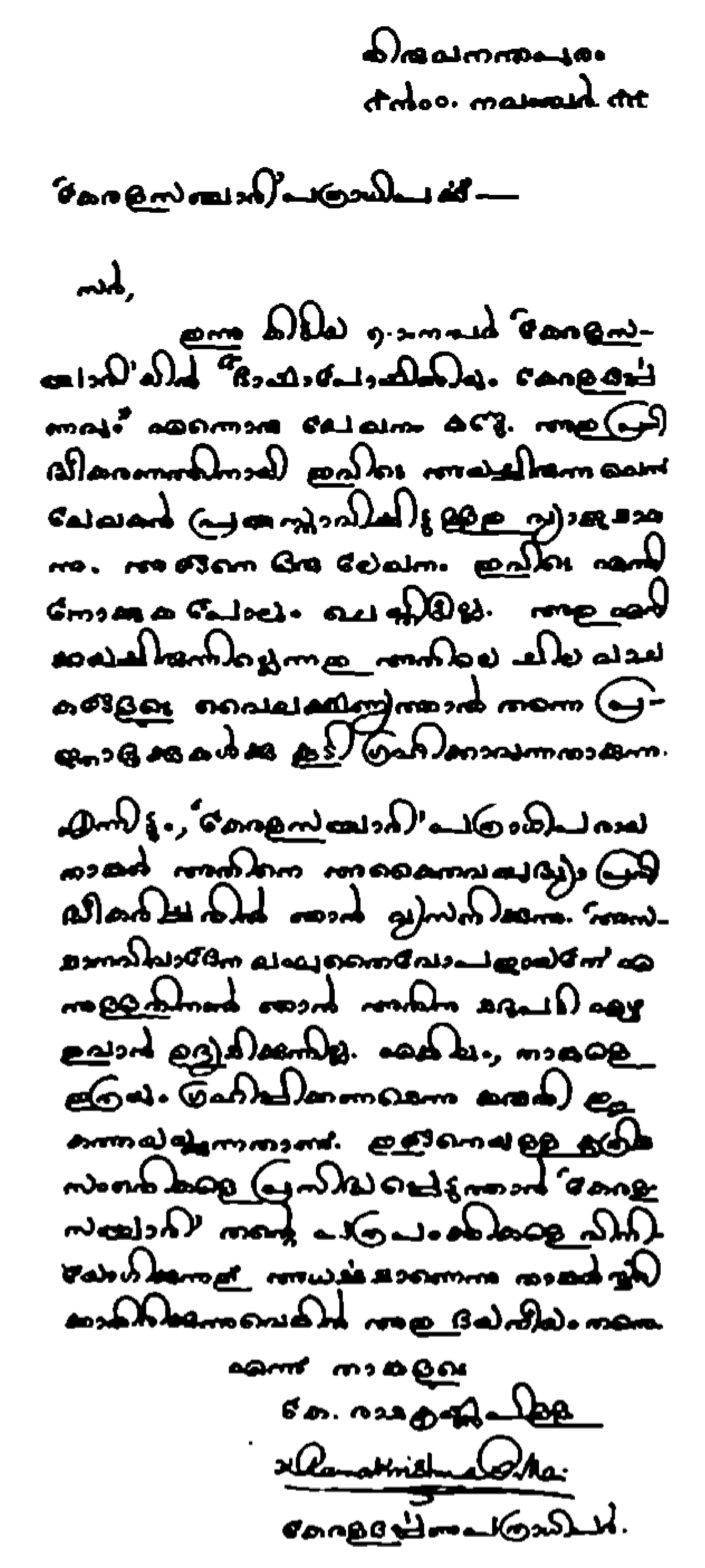 'കേരള ദർപ്പണം' പത്രാധിപരായിരിക്കെ സ്വദേശാഭിമാനി എഴുതിയ ഒരു കത്ത്.